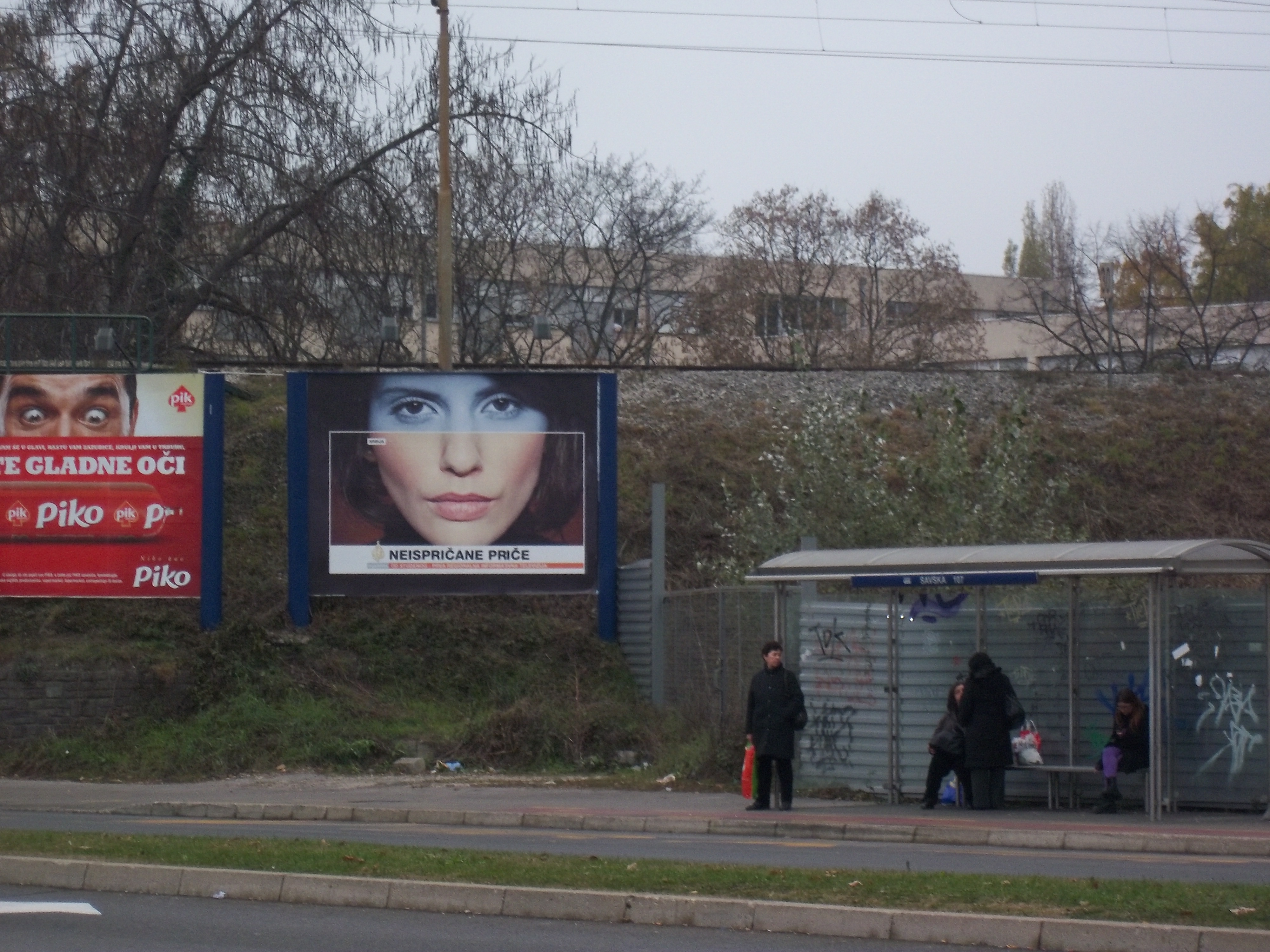 Promotivni plakati regionalne televizije Al Jazeere u glavnom gradu Republike Hrvatske, Zagrebu.